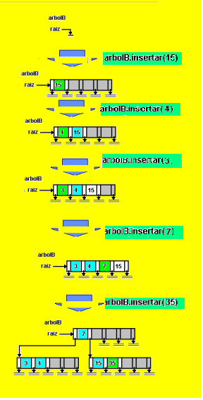 arbol b